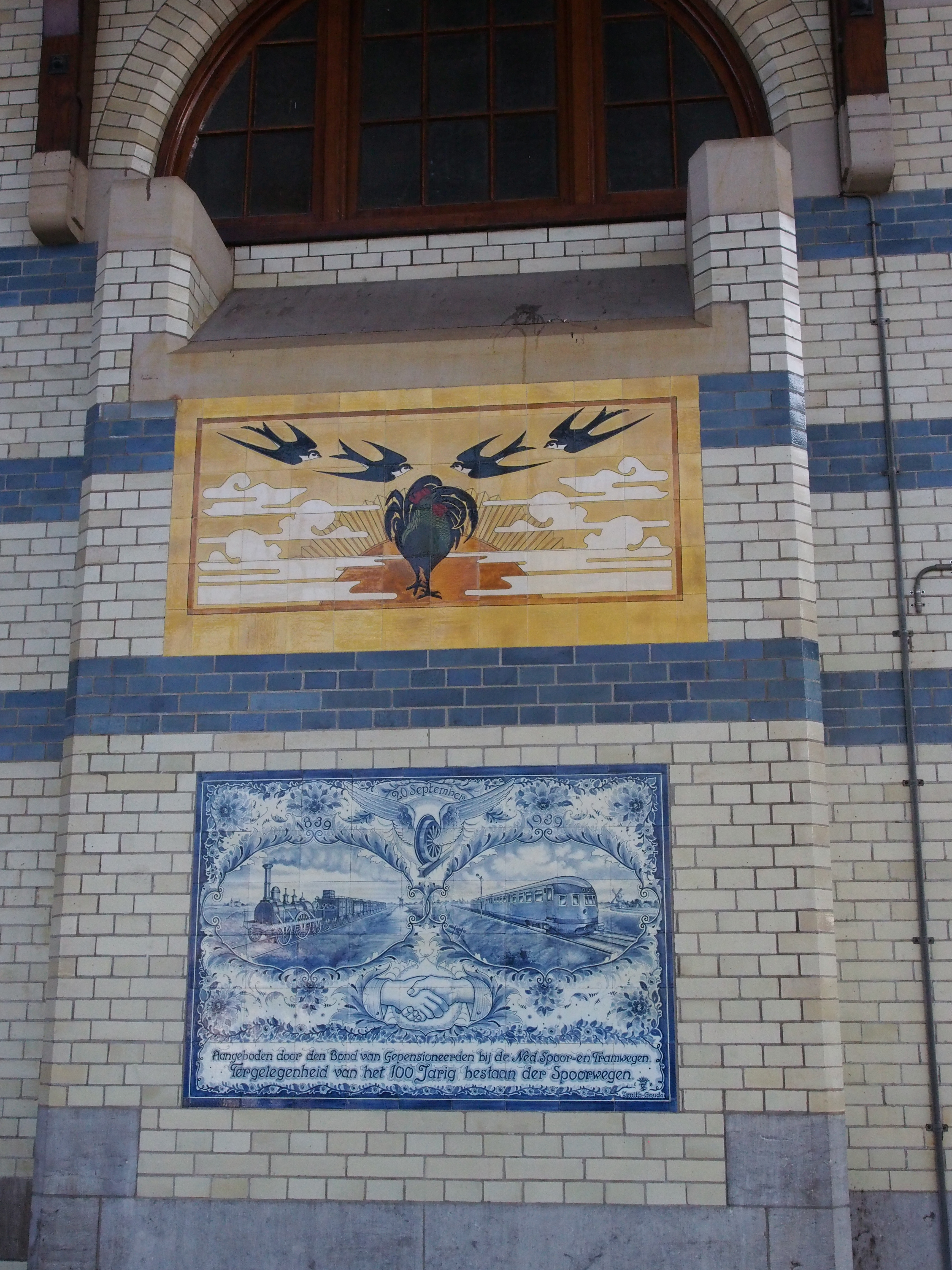 Station Haarlem: tegeltableaus